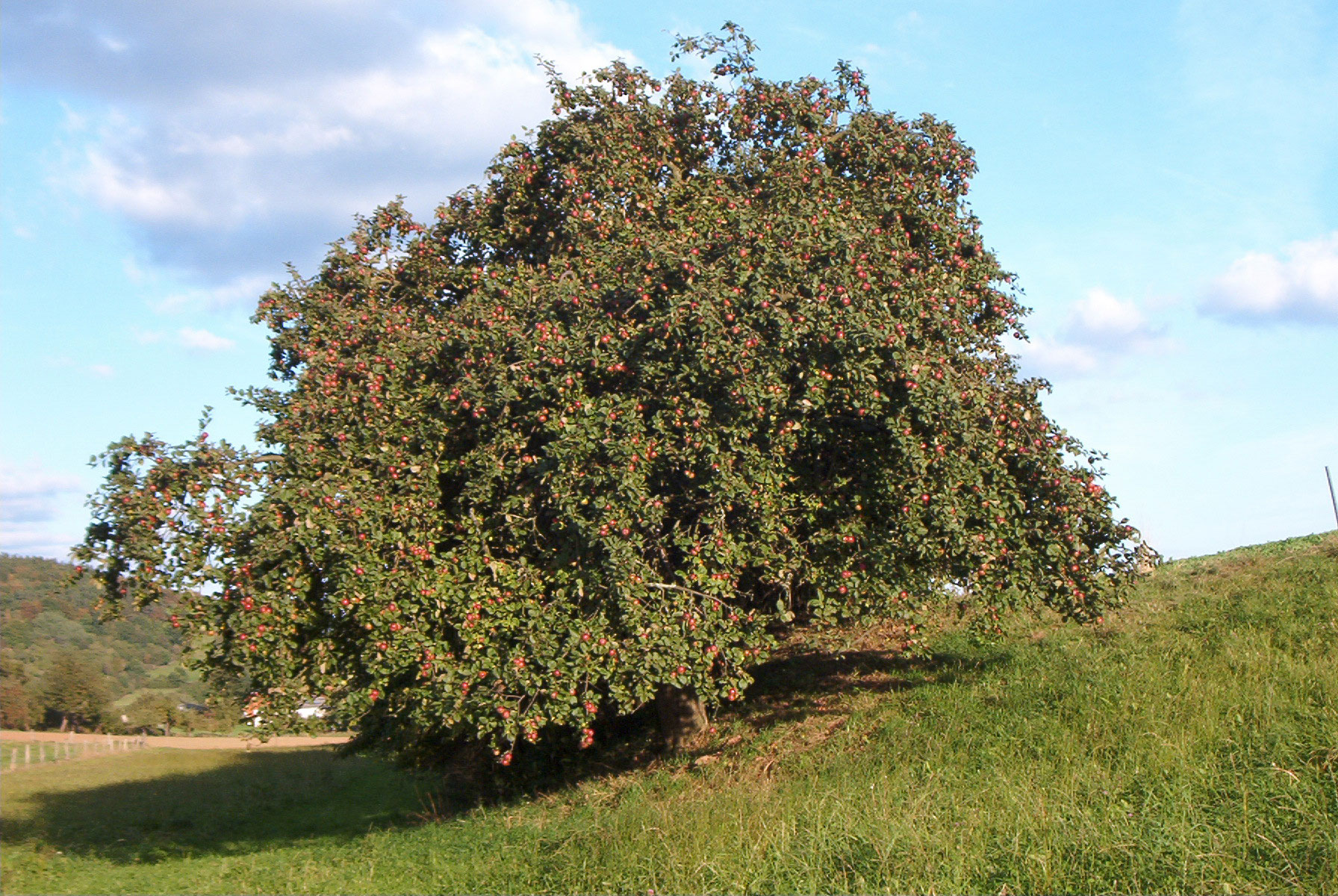 Appletree, Winterrambour/Winterrambur / Apfelbaum (Hochstamm), Sorte Rheinischer Winterrambur; Burgwald-Ernsthausen, Germany